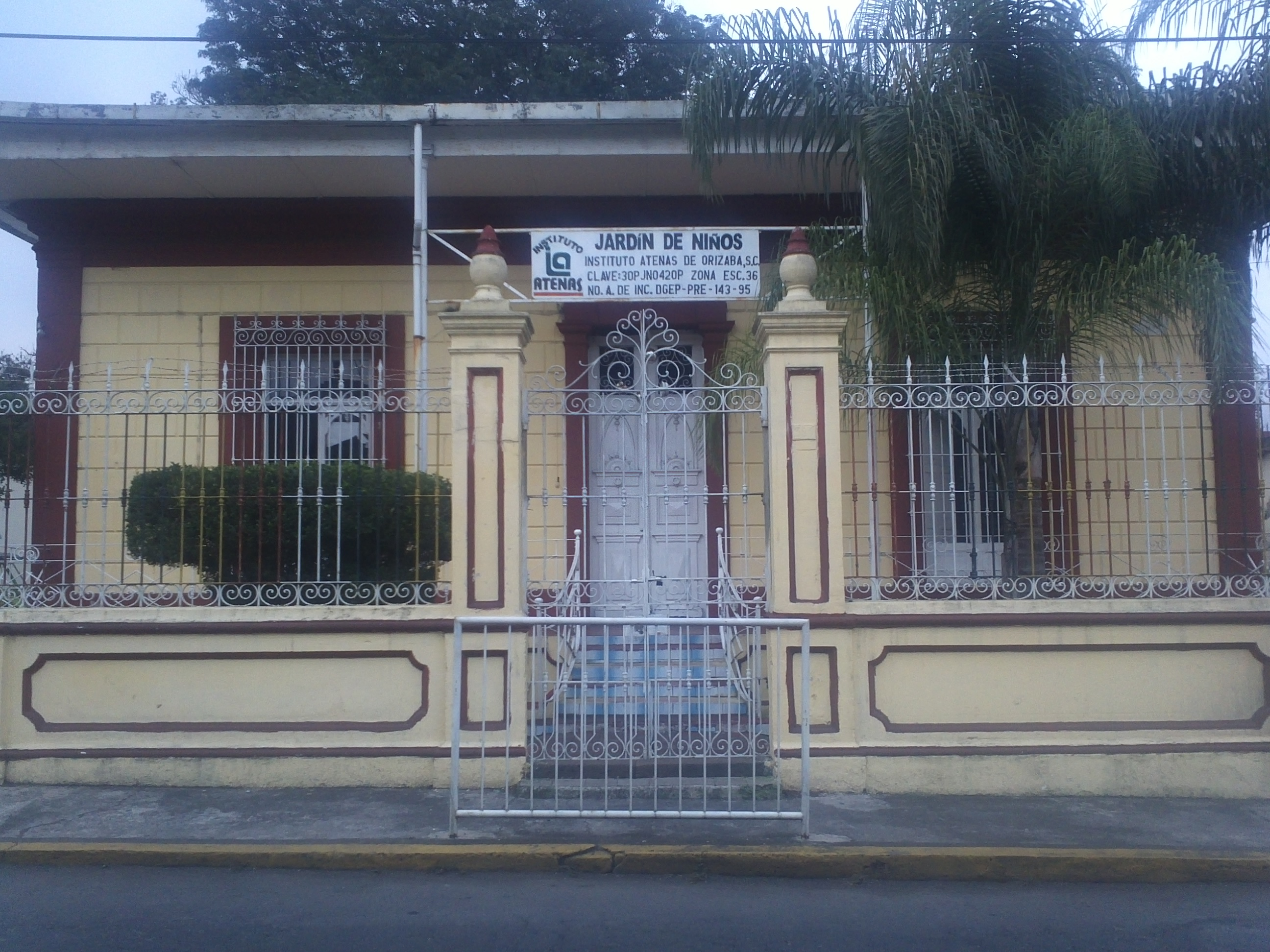 Casa donde nació Sara García en Orizaba, Ver.